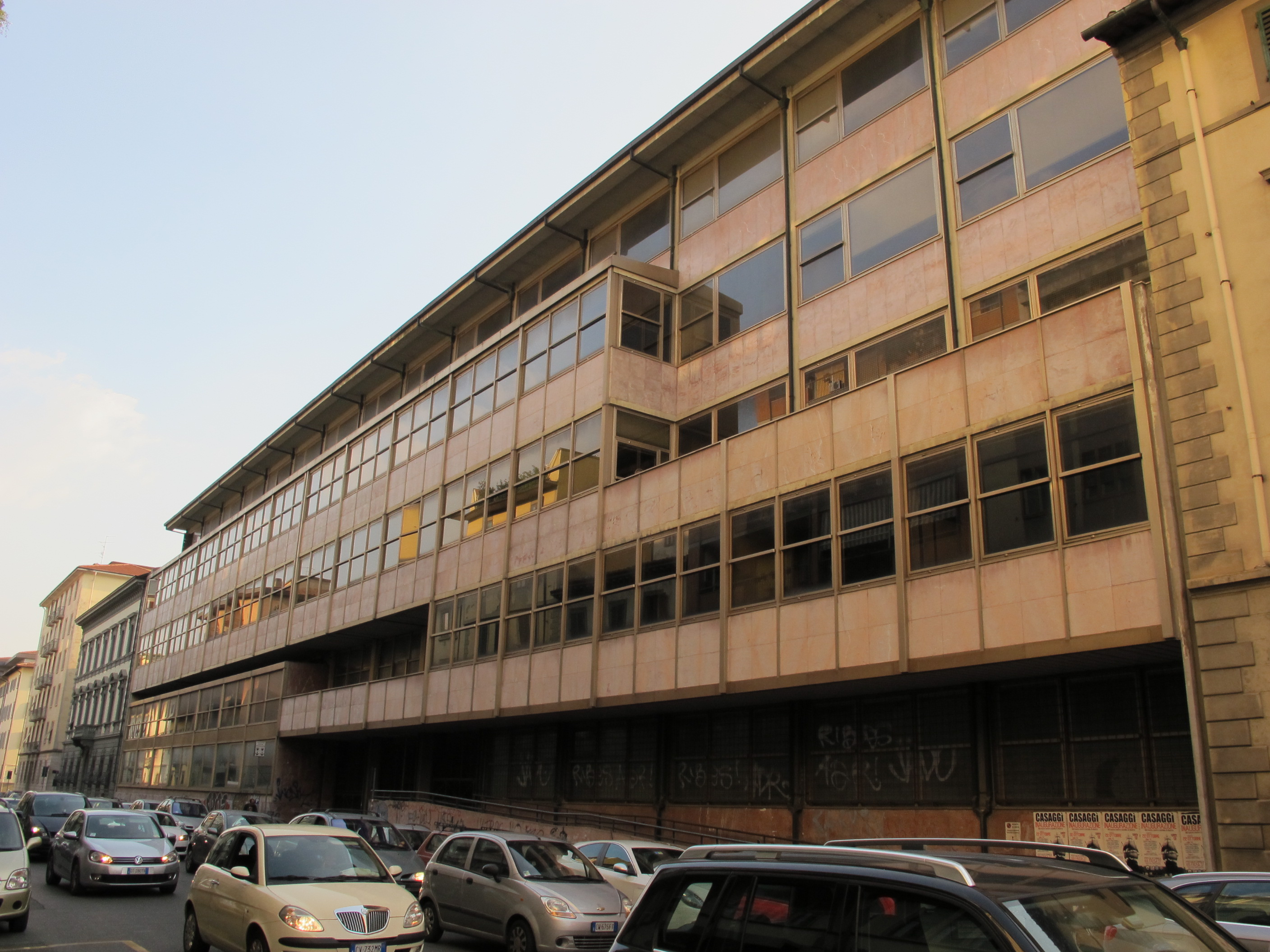 Palazzo ex-sip di via masaccio, firenze